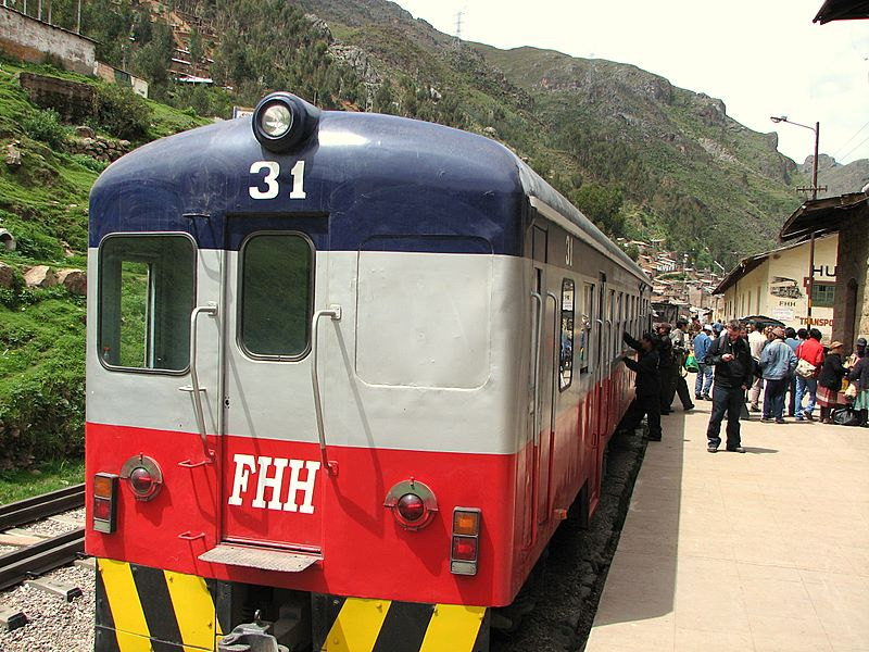 El Coche Motor que une las dos ciudades; también hay trenes tradicionales. Licensing